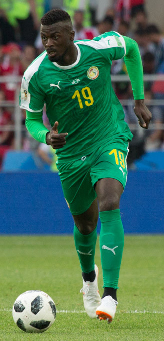 Польша неожиданно проиграла Сенегалу